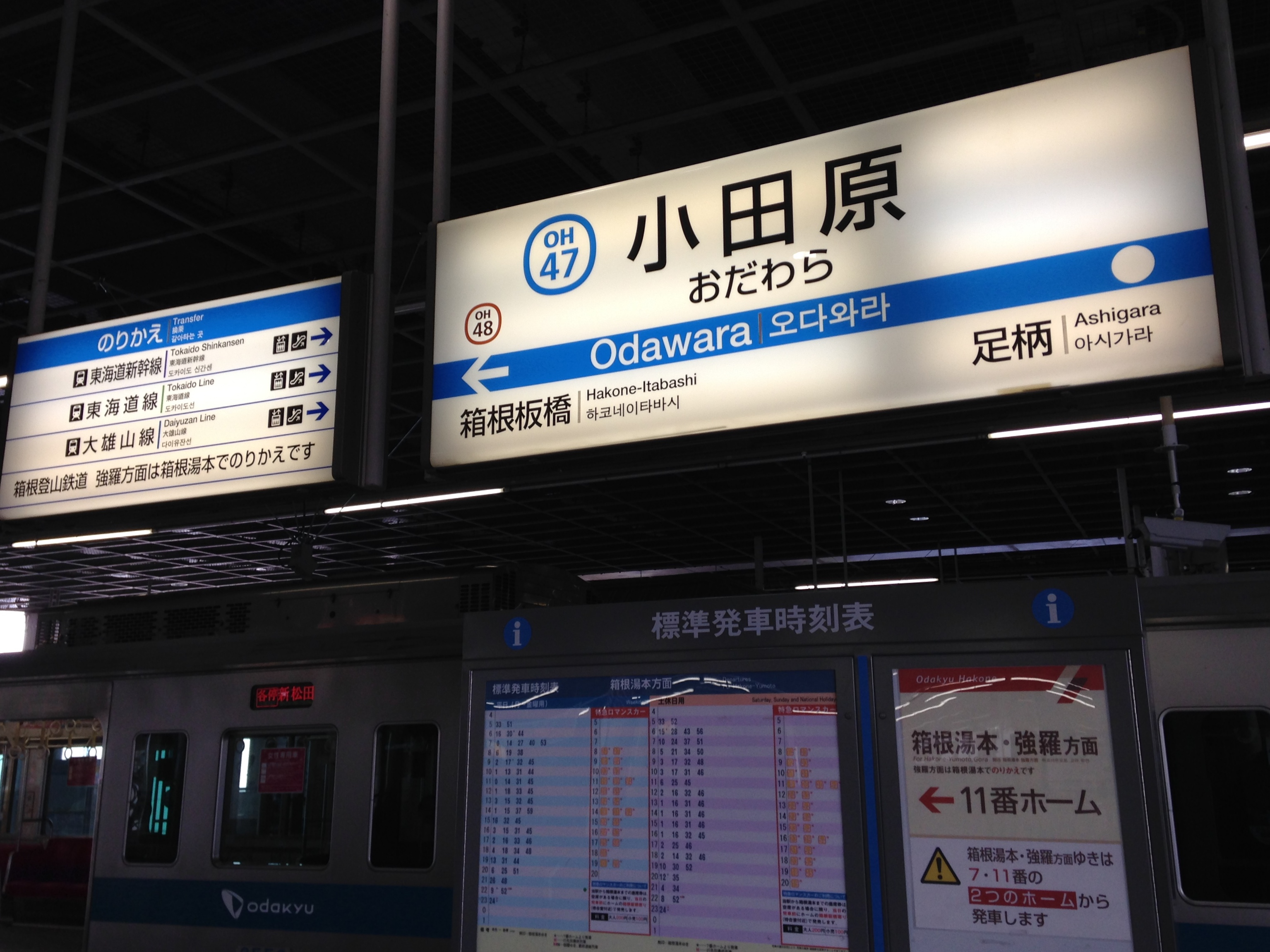 小田原駅(小田急小田原線および箱根登山鉄道)の駅名標(小田急バージョン)